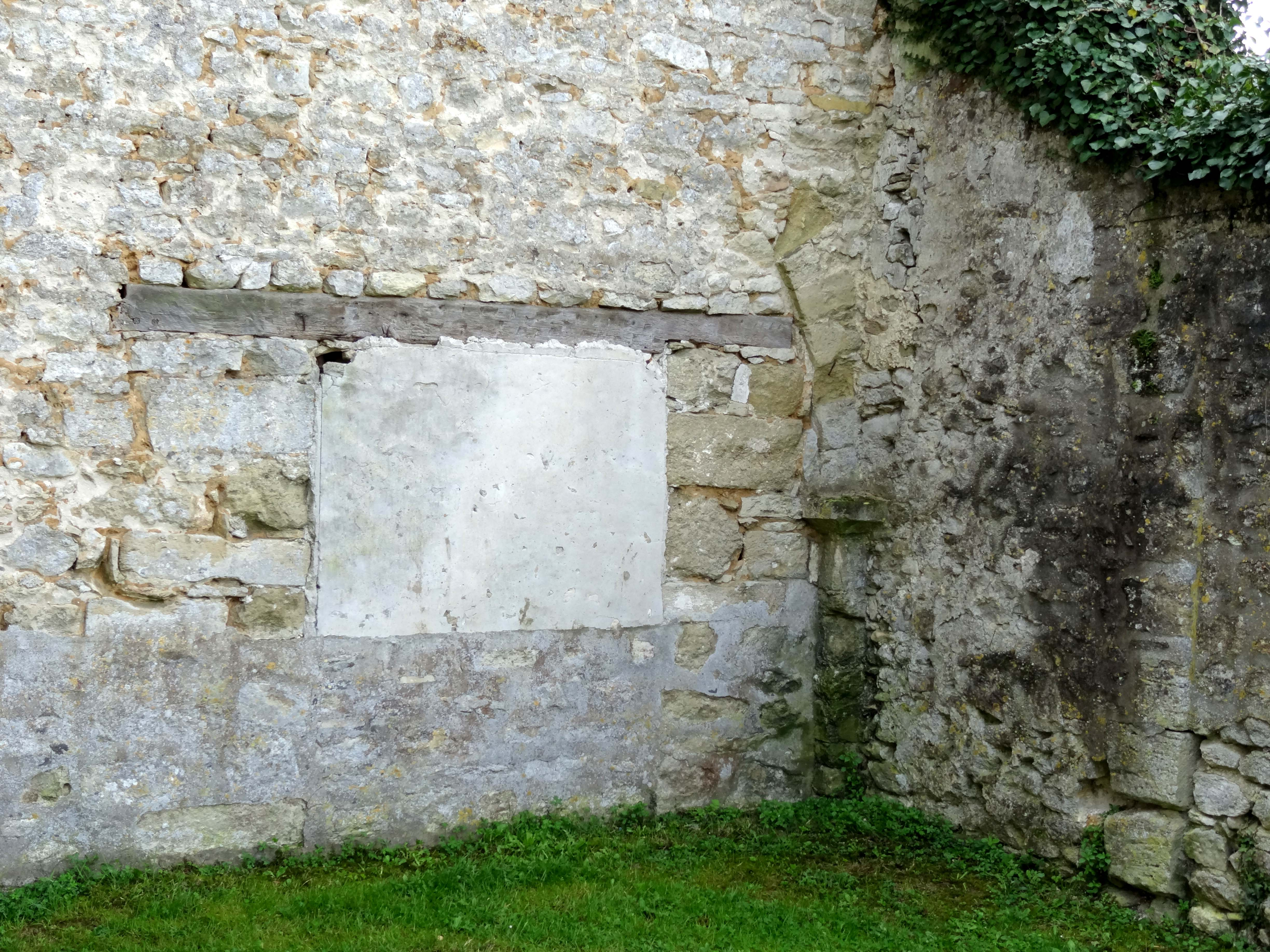 Église Saint-Martin de Follainville - voir titre.